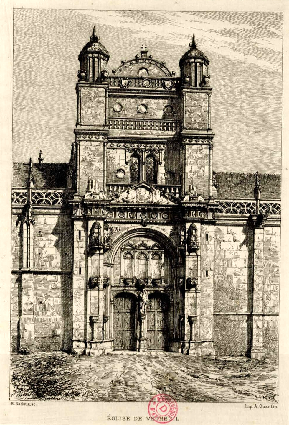 Façade occidentale, vers 1880.